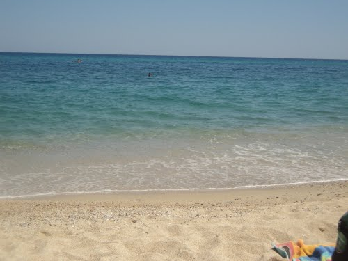 Mar Ionio,Catanzaro Lido.